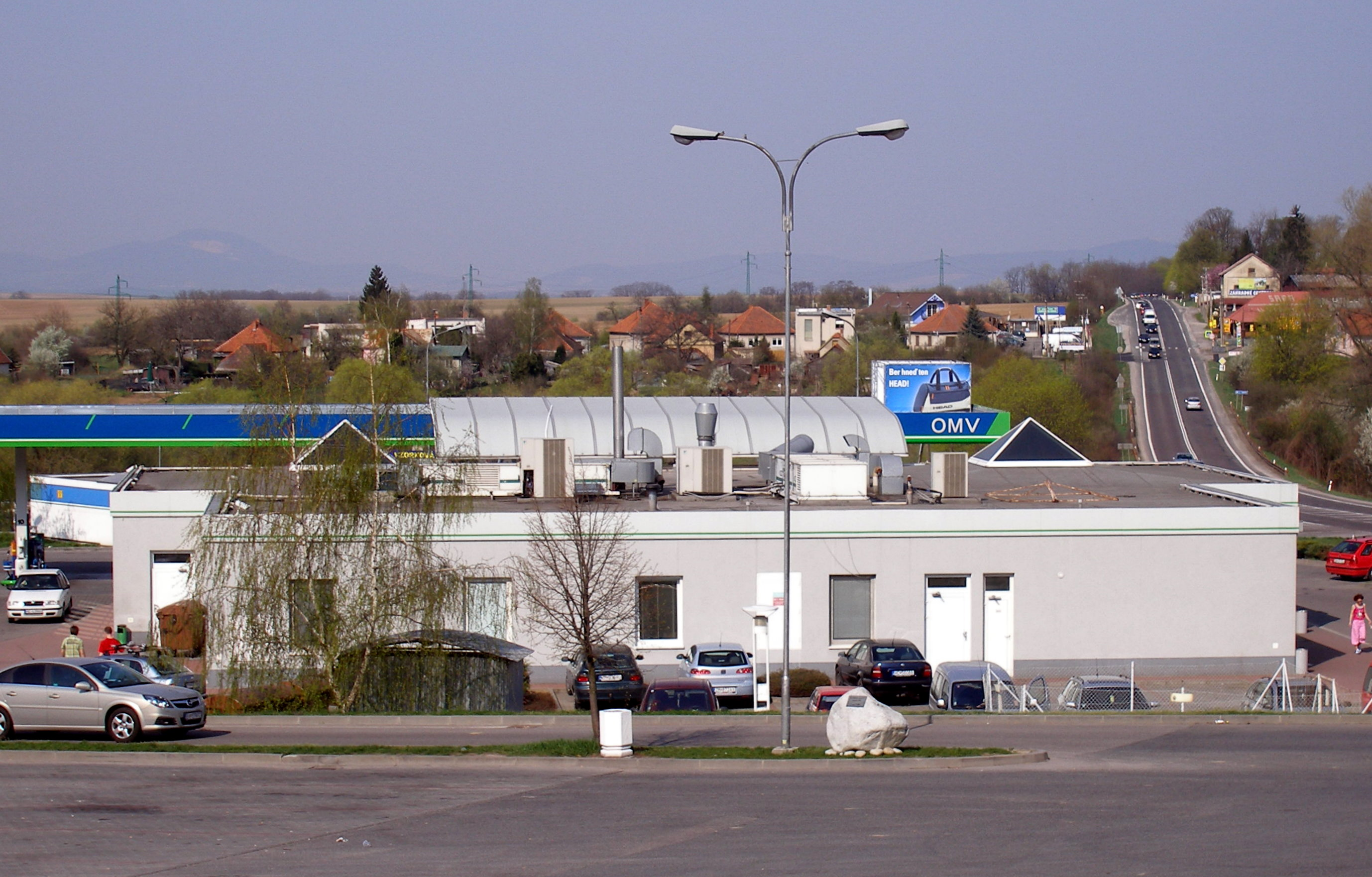 Obec Volkovce okres Zlaté Moravce